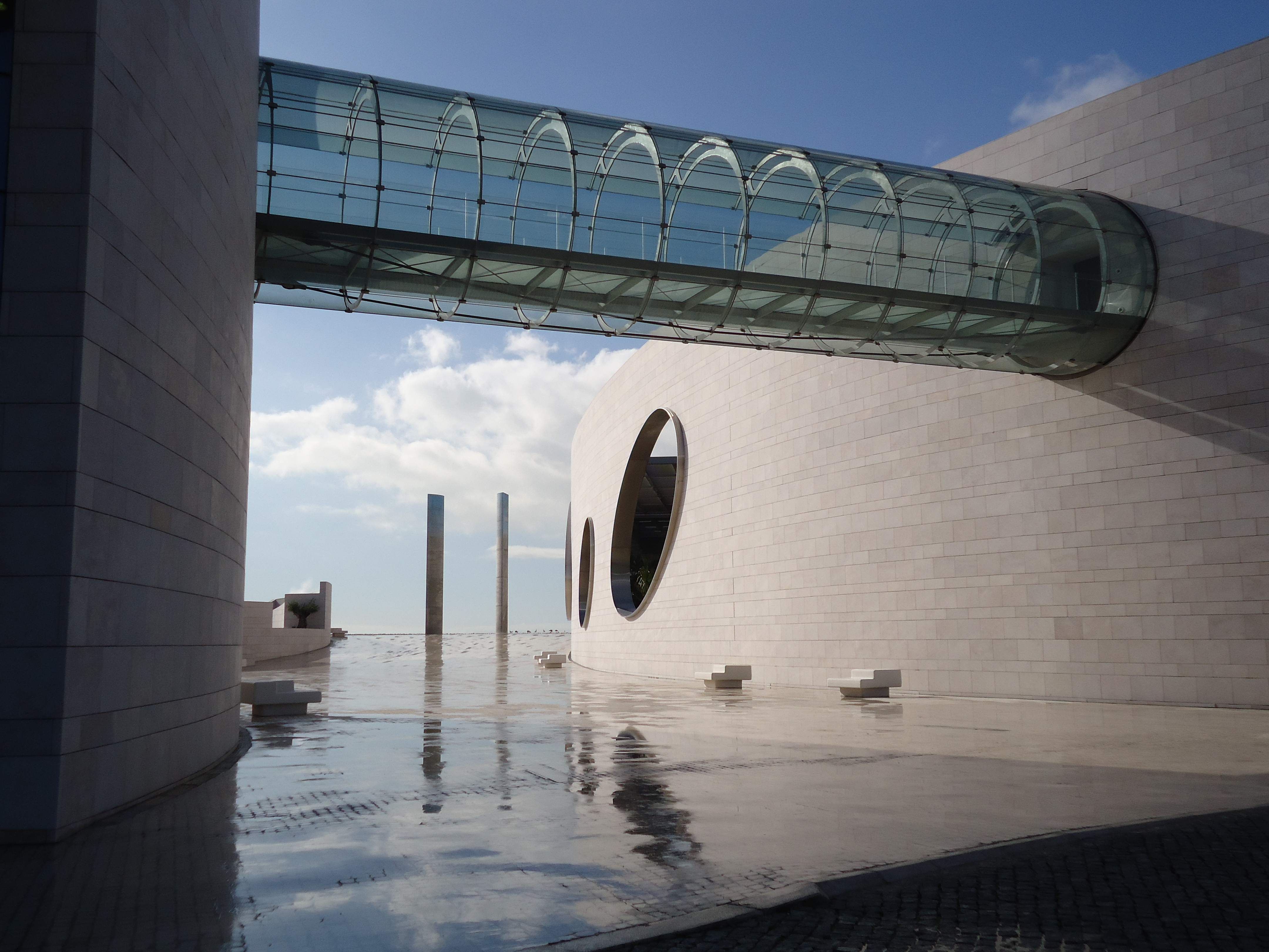 Champalimaud Centre for the Unknown, Lisboa, Portugal: vista externa.